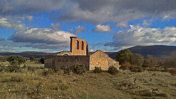 Fachadas orientadas al sur. Vista de la antigua iglesia parroquial de Gargantilla de Santiago, un despoblado de origen medieval perteneciente hoy día al municipio de Gargantilla del Lozoya y Pinilla de Buitrago (Comunidad de Madrid, España).